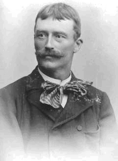 Picture of Ludwig Purtscheller in 1890